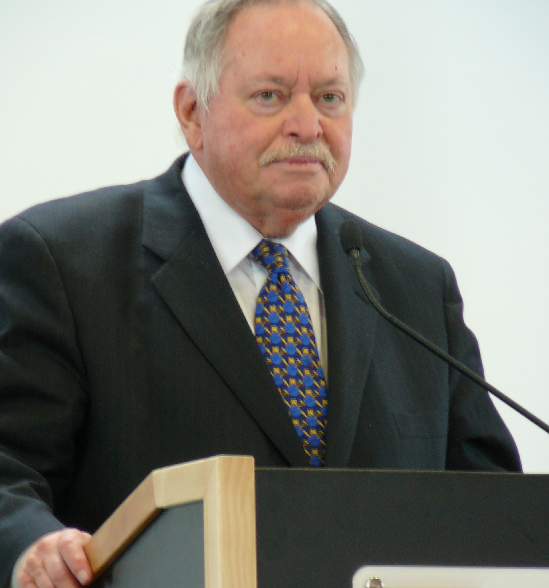 Recadrage de Image:acques Parizeau UL.jpg, 26e Premier ministre du Québec donnant une allocution à l'Université Laval de Québec. Photo prise par Joël Truchon 20 mars 2007 Mise en ligne par Jotru